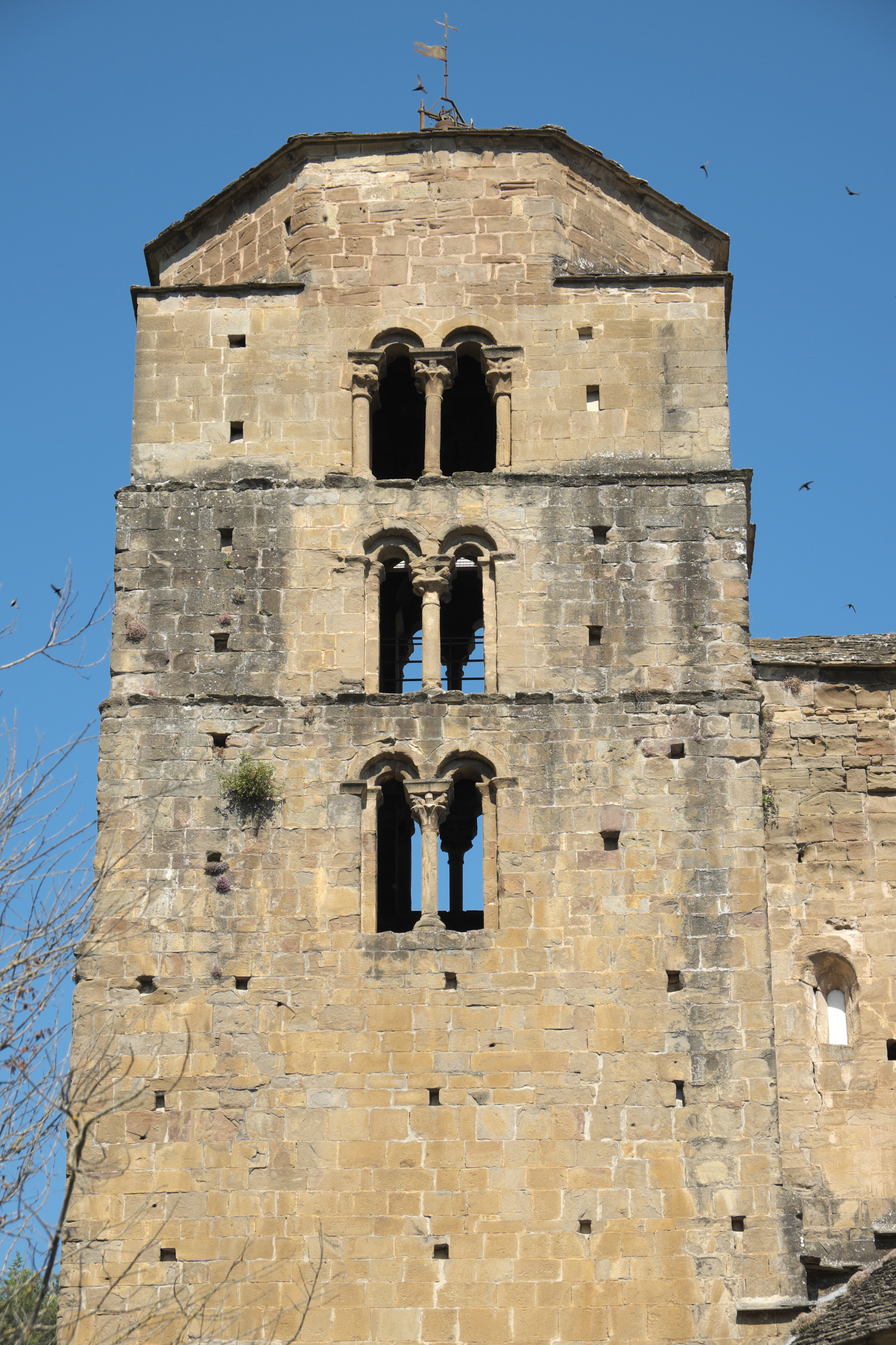 Pfarrkirche und ehemalige Klosterkirche Santa María in Santa Cruz de la Serós in der Provinz Huesca (Aragón/Spanien), Glockenturm aus der Mitte des 12. Jahrhunderts